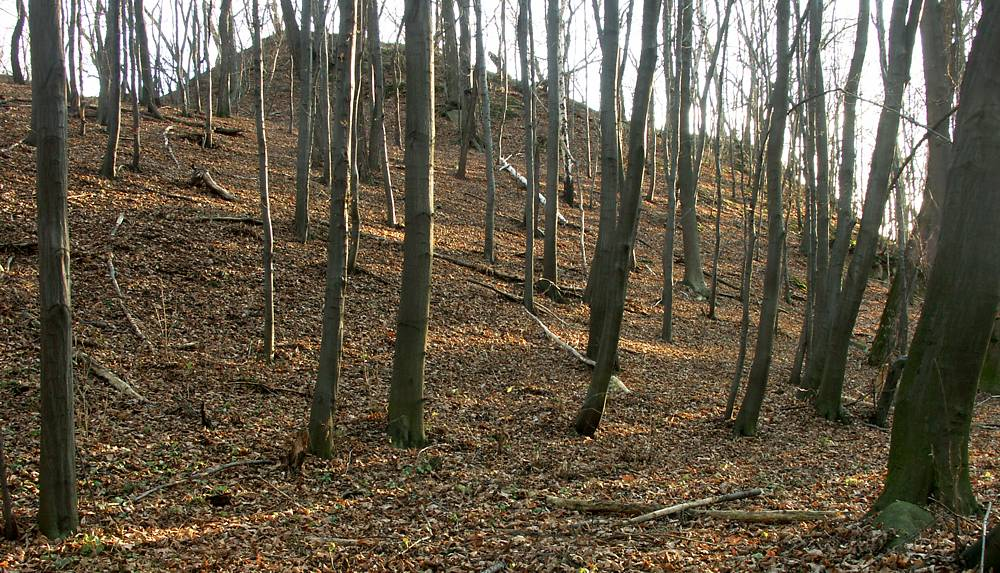 Der Alte Wall mit dem Bielplatz (1000 Jahre alte slawische Siedlung)